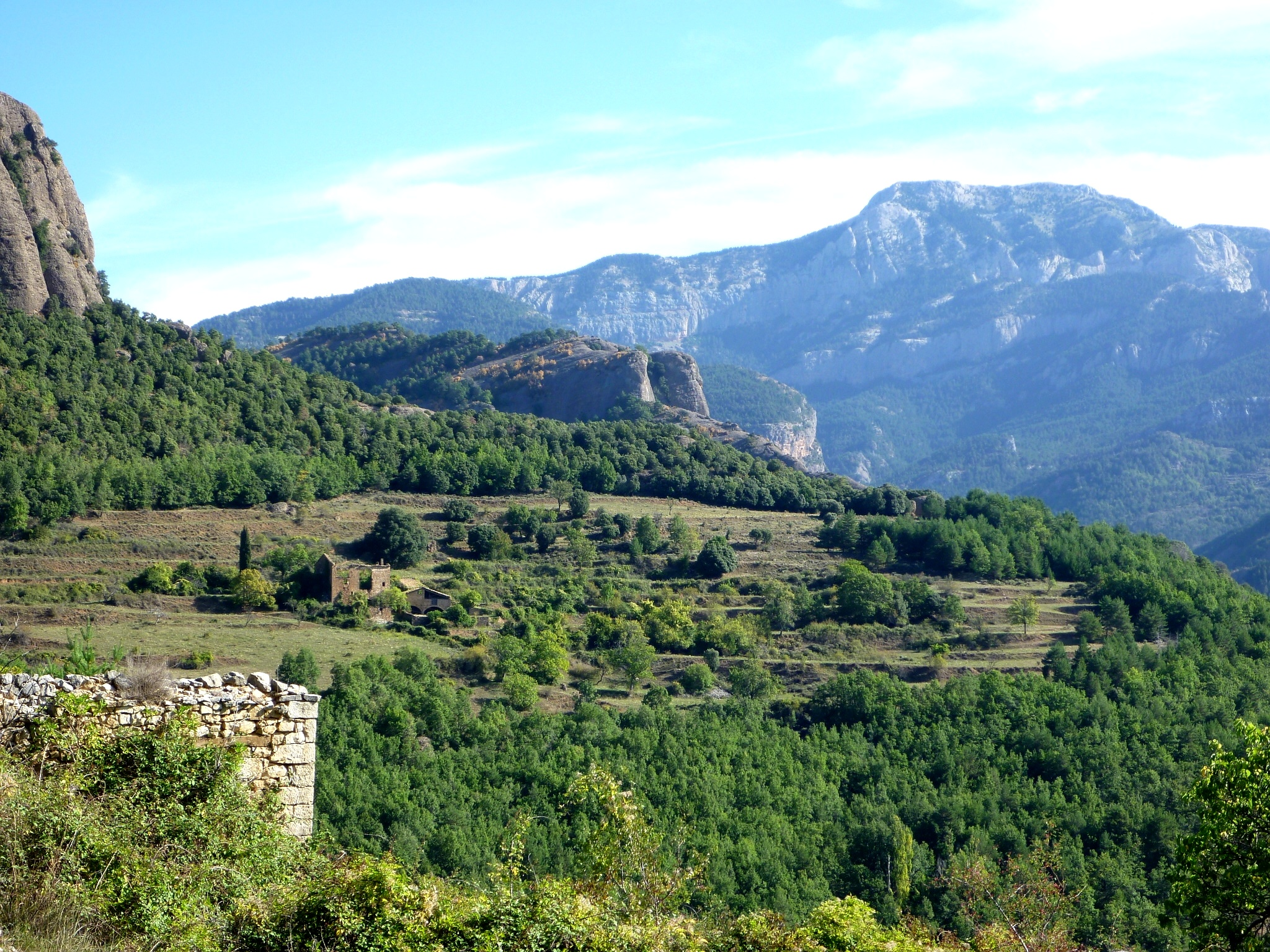 Torre de la Corriu (Guixers): envoltada de prats de pastura